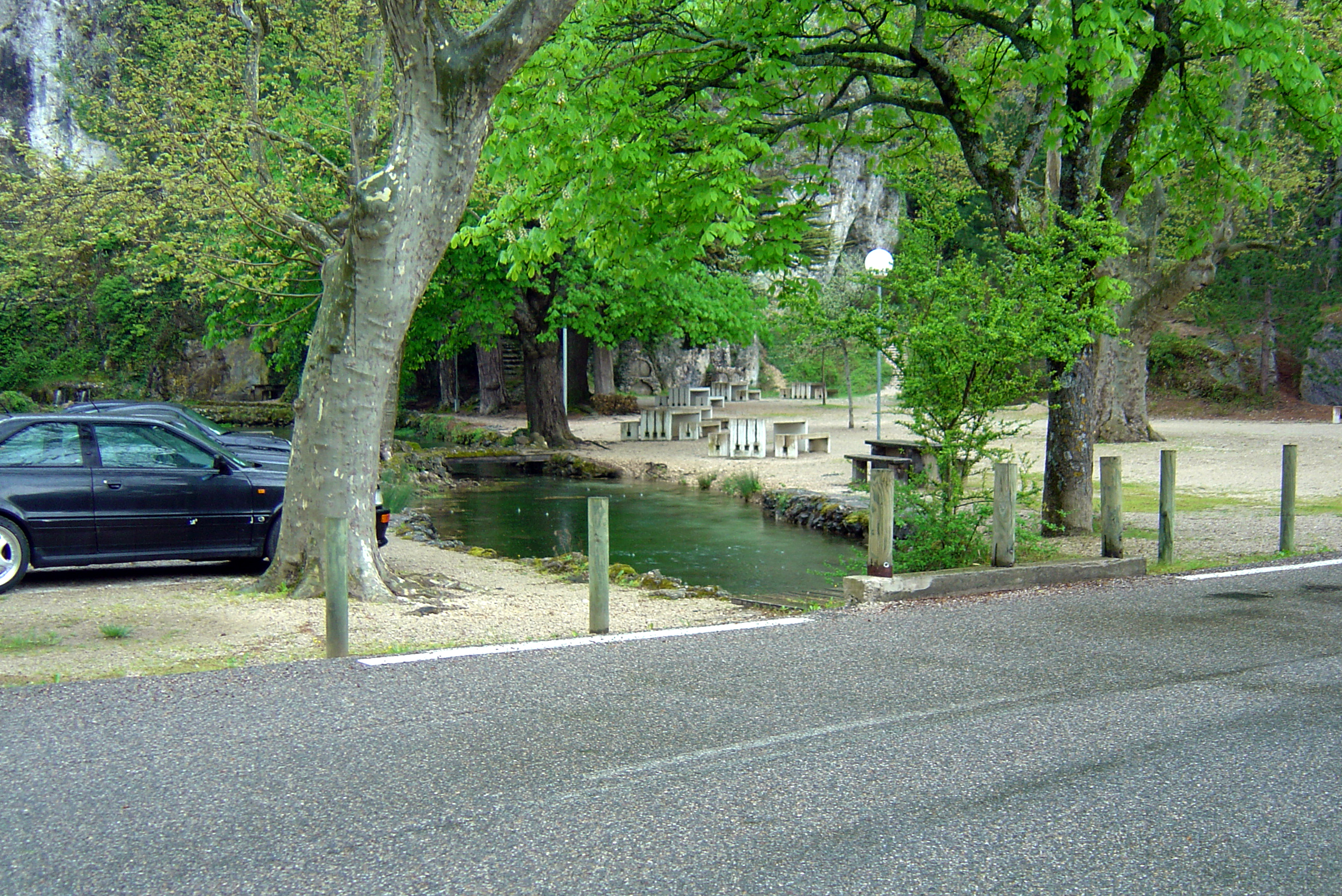 Source du Groseau au début de l'ascension après Malaucène